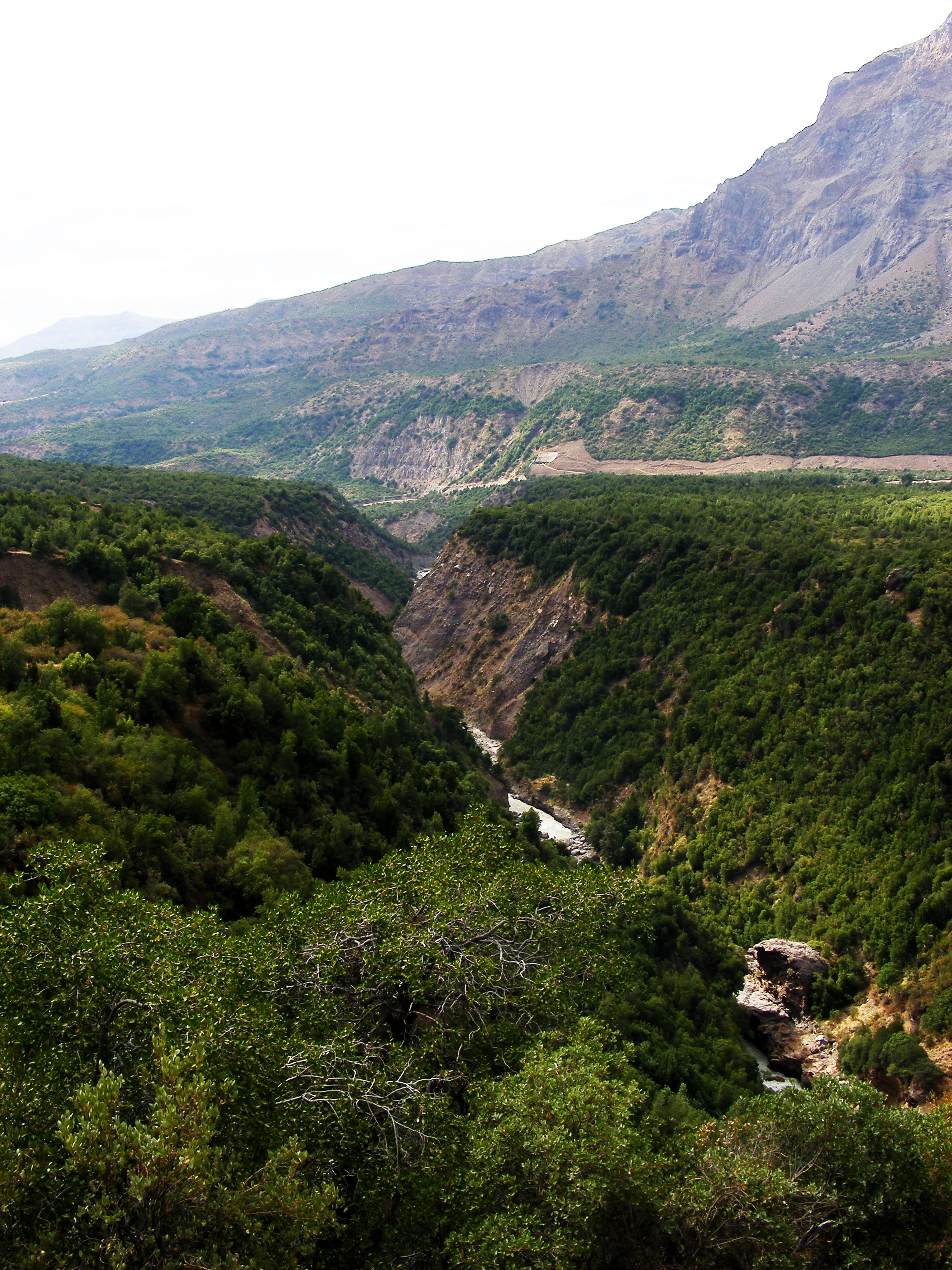 Vista del Río Cipreses desde el camino que lo bordea en la Reserva Nacional Cipreses, Chile.